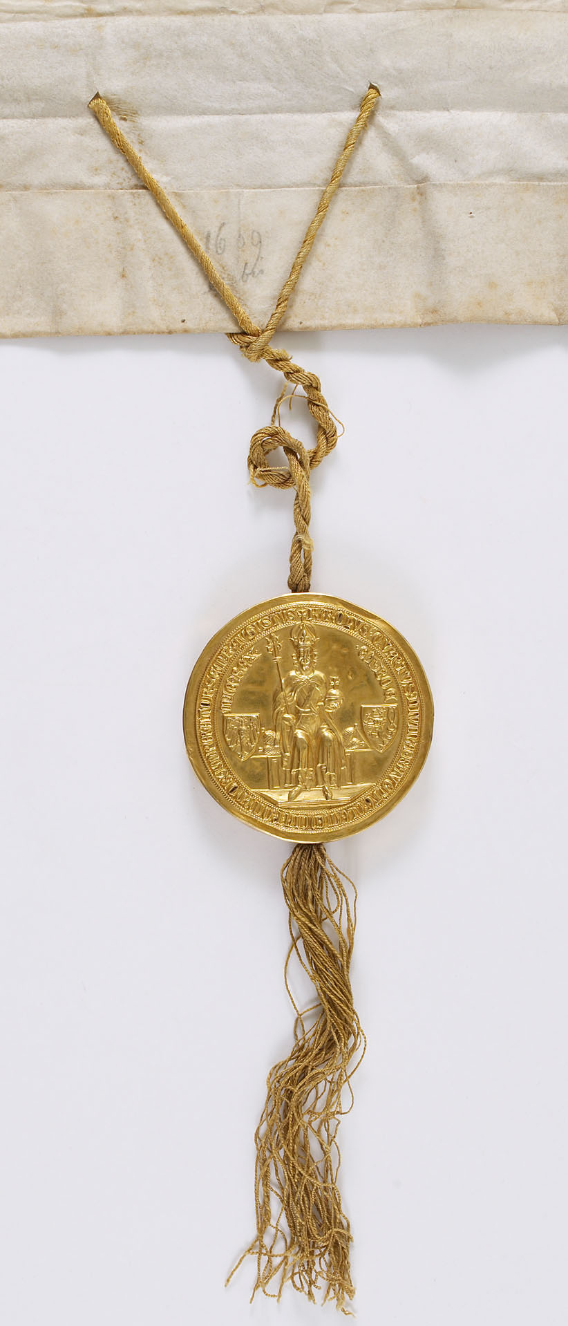 Bulle d'or sur lacs de soie jaune appendue à la charte par laquelle l'empereur Charles IV émancipe son neveu le dauphin de France Charles (futur Charles VI), âgé de dix ans, scellée le 5 janvier 1378.